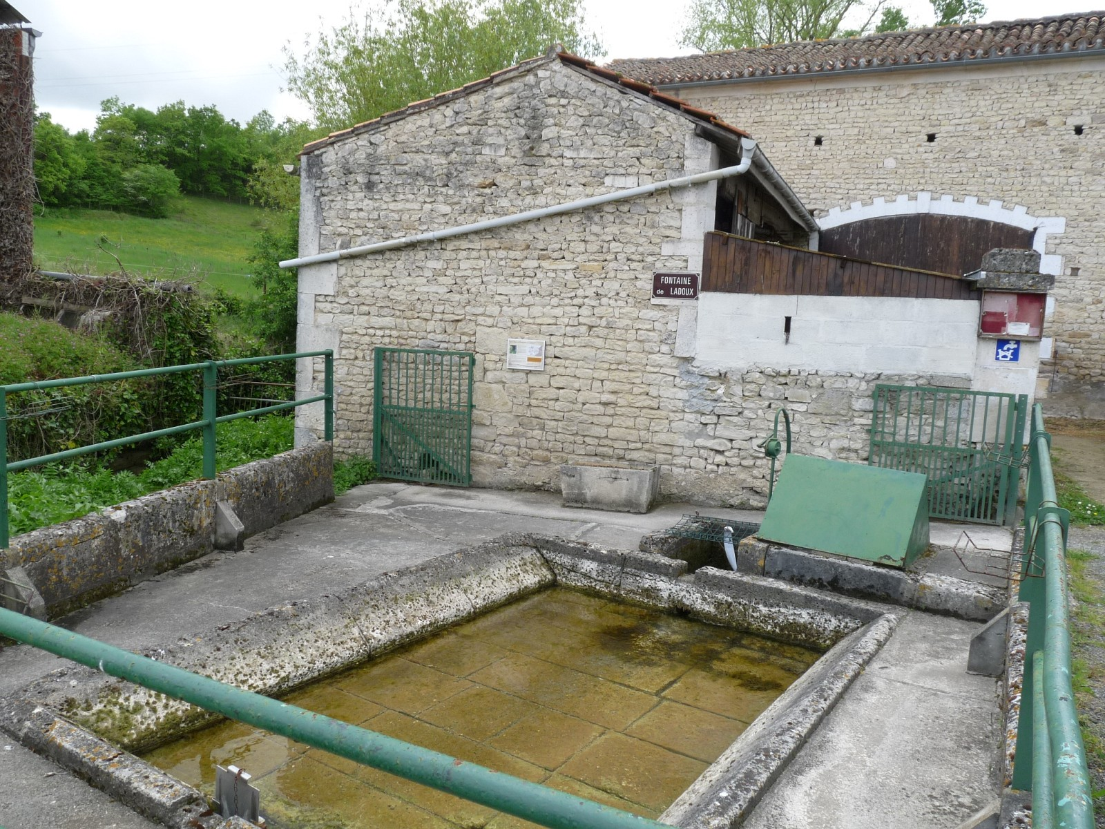 Fontaine de Ladoux (le Cros), Marsac, Charente, France